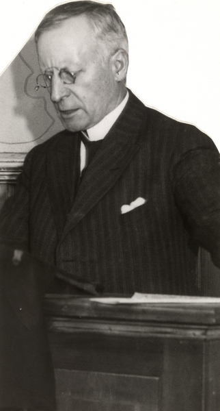 portrett, mann, prest, stående halvfigur ved talerstol. Ole Puntervold var sjømannsprest i Port Elizabeth i Sør-Afrika 1903-05, og i Buenos Aires 1906-08. Han var res. kap. i Grønland menighet i Oslo fra 1925.